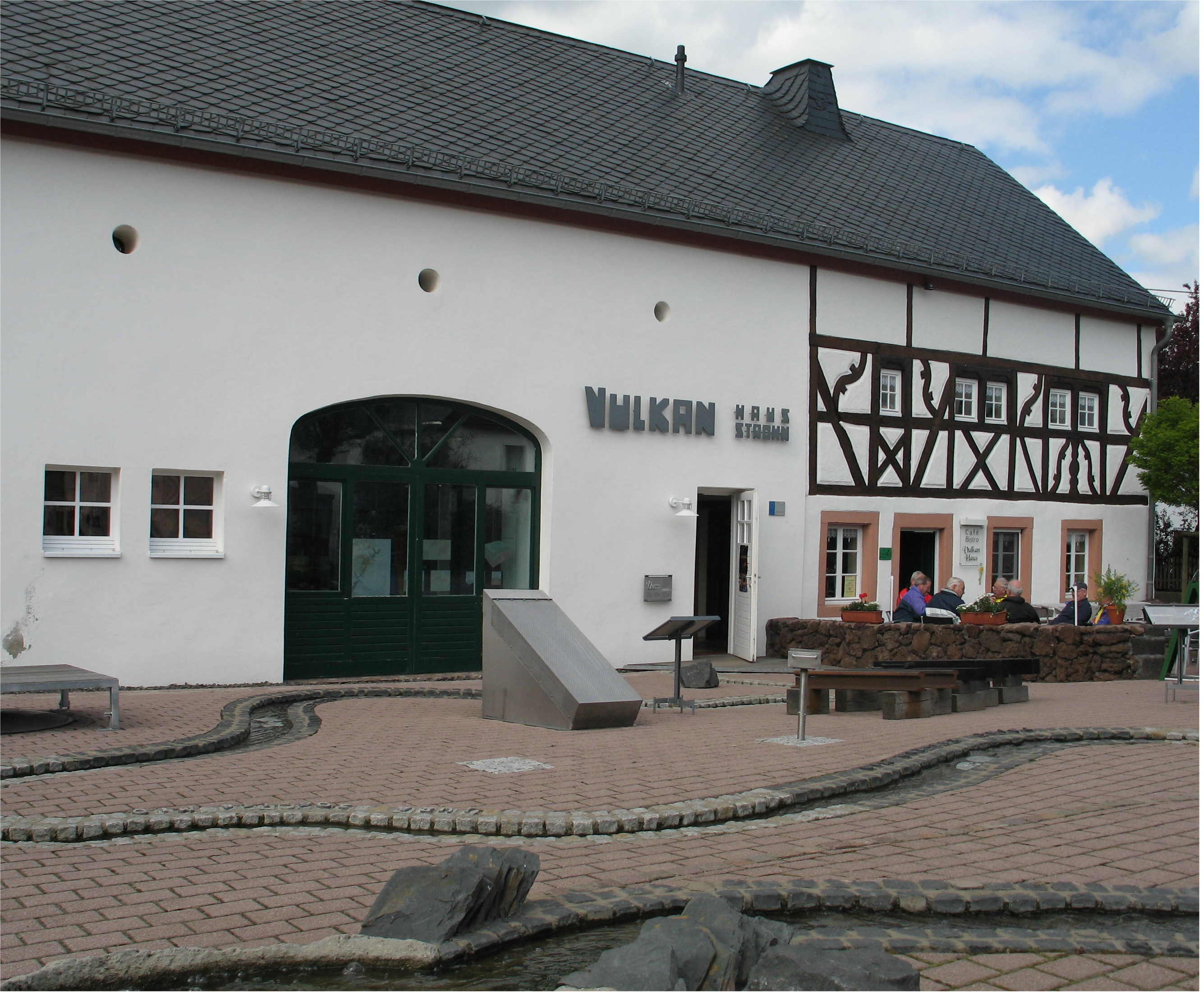 D'Vulkanhaus vu Strohn (Vulkaneifel)